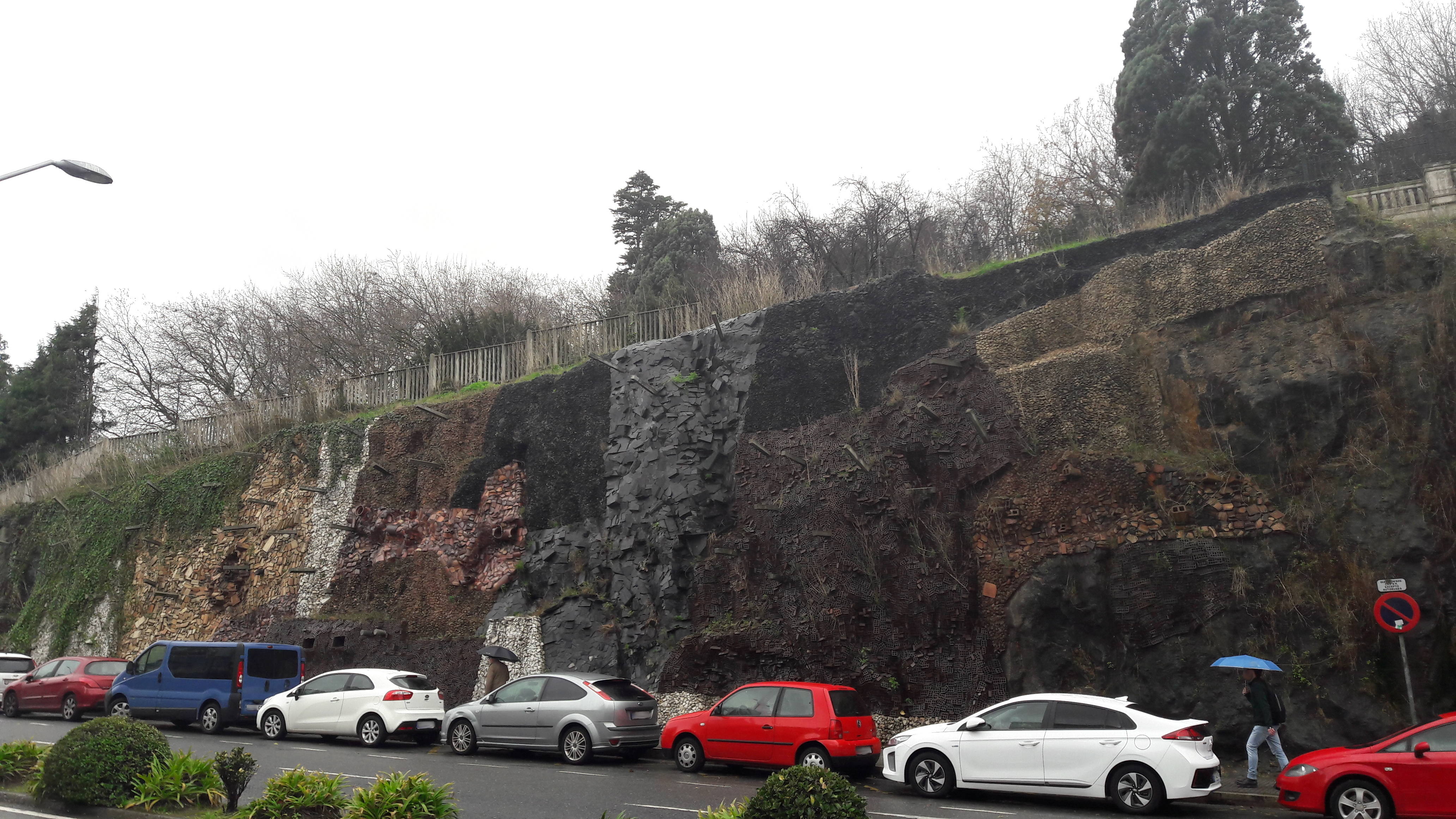 Mural da canteira de Santa Margarida, de Leopoldo Nóvoa